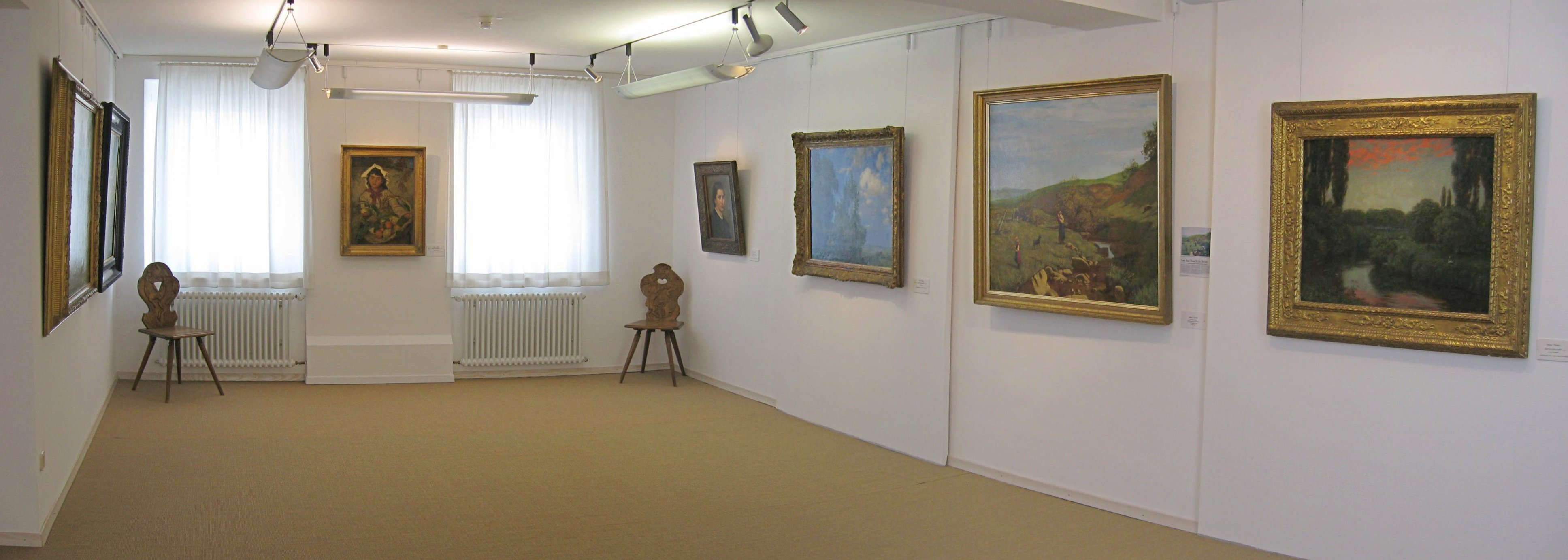 Museum mit Bildern von Hans Thoma